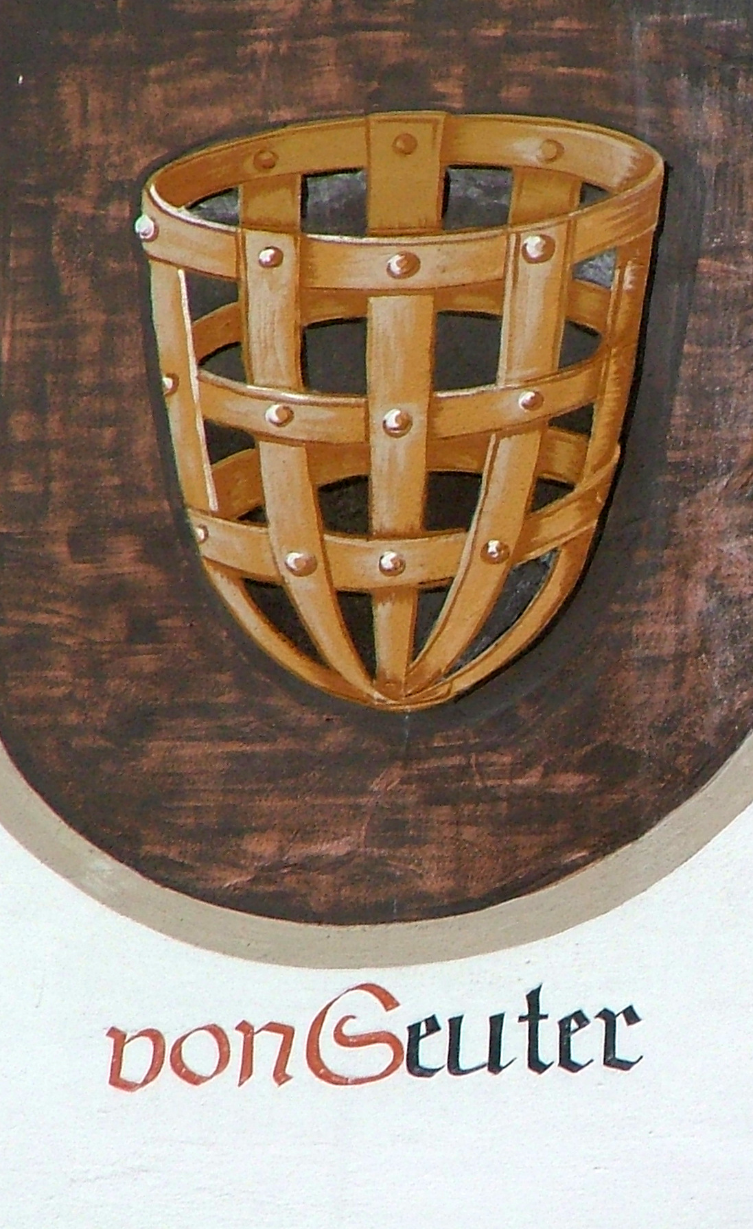 Außen am Rathaus